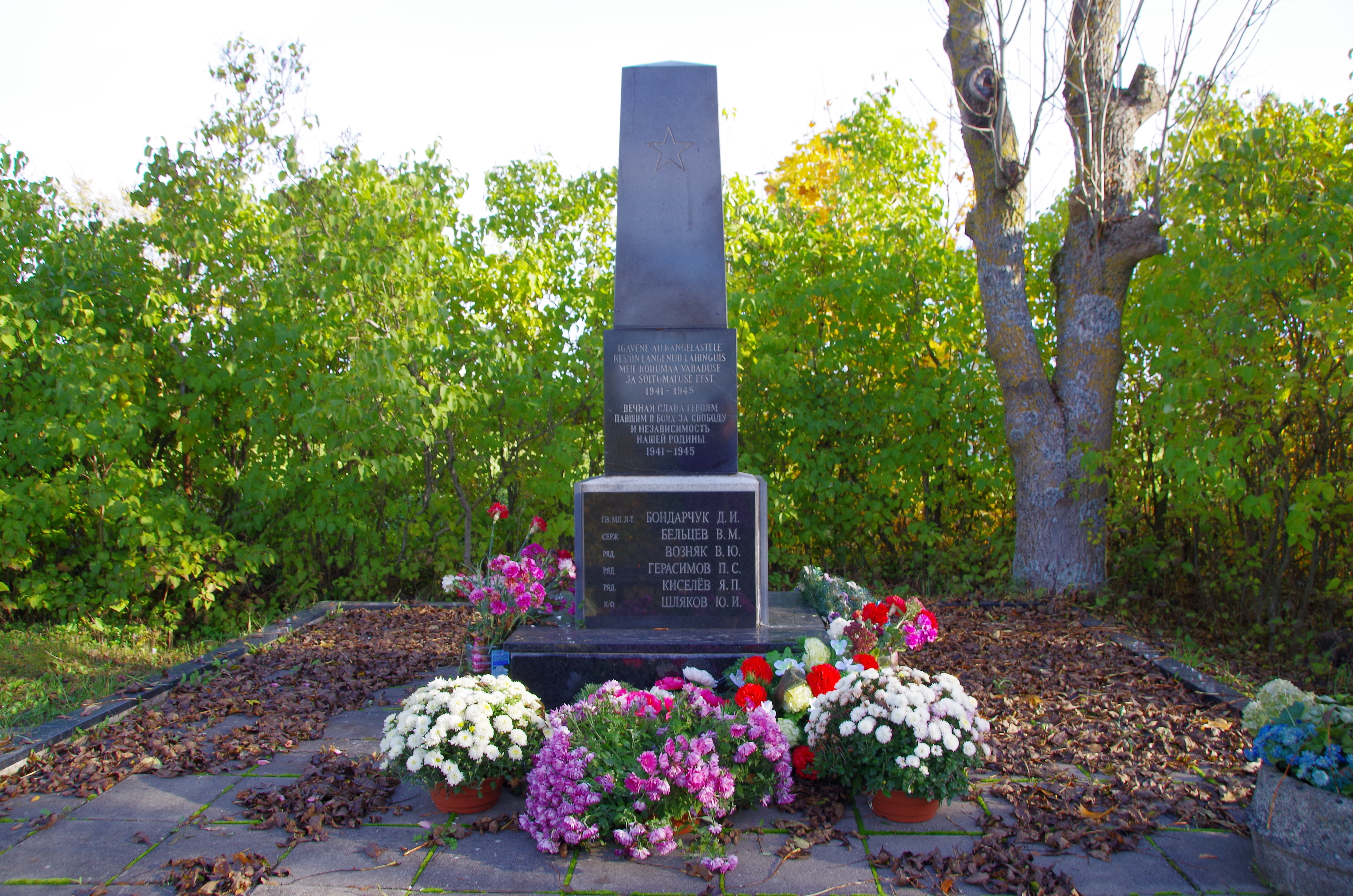 Paldiski II maailmasõja matmispaik paikneb Paldiski õigeusu kalmistu põhjapoolses osas.